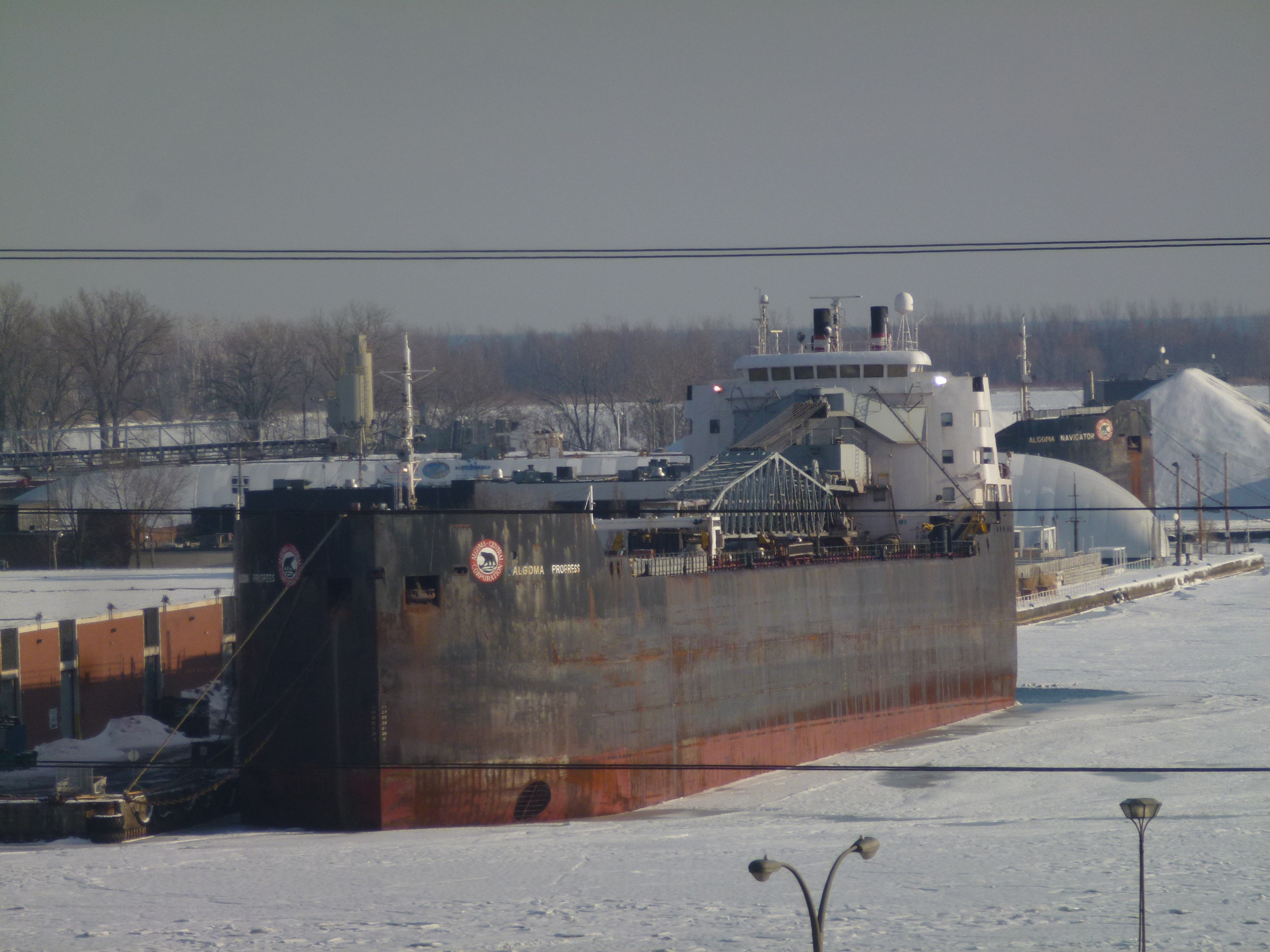 Frozen Toronto harbour, 2014 02 03 (55)